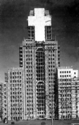 El edificio Kavanagh en construcción, decorado con una cruz con motivo del Congreso Eucarístico que se llevó a cabo en octubre de 1934 en Buenos Aires, Argentina.